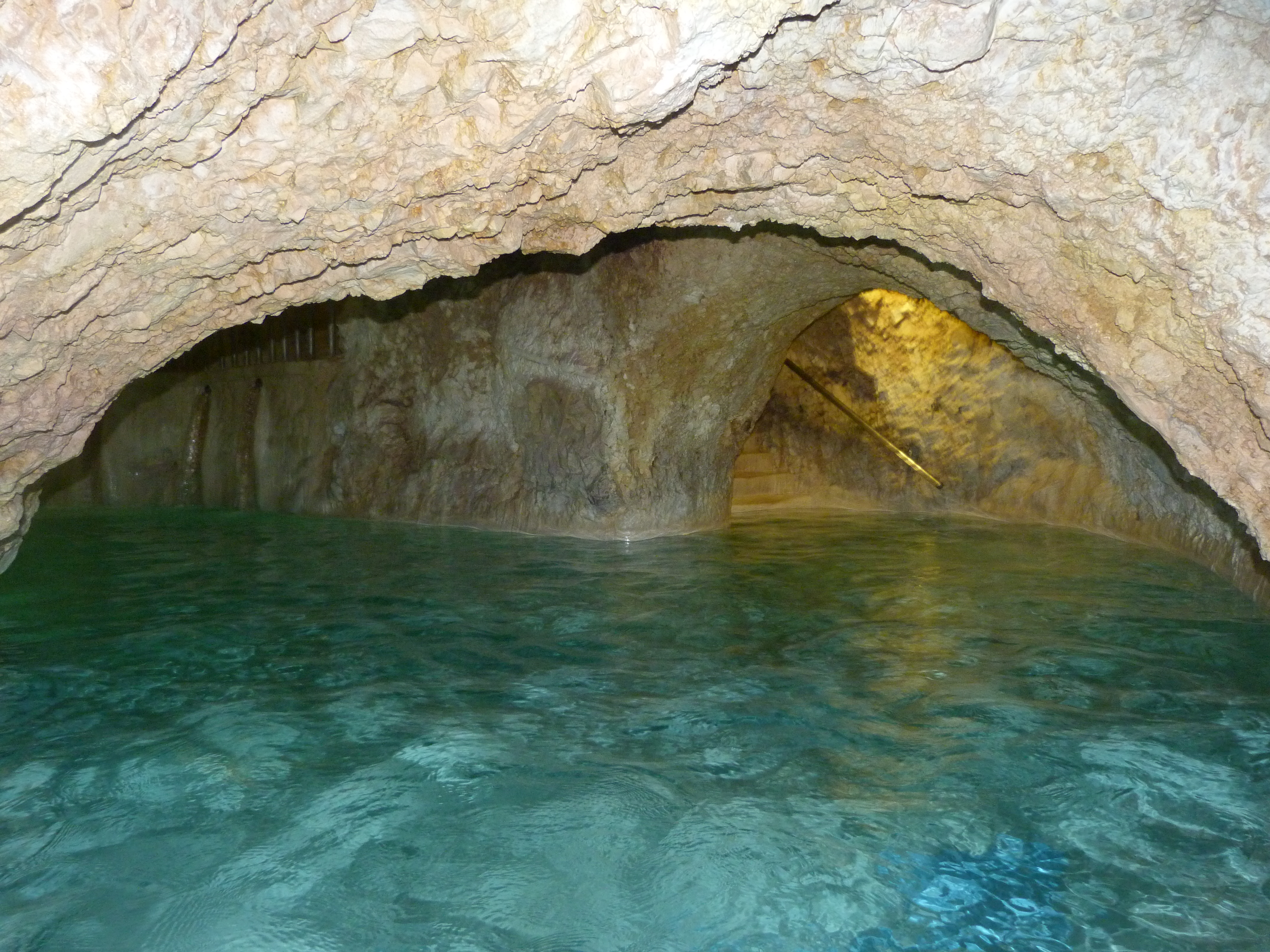 Miskolc, Pazár sétány 1., Telefon: +36-46 560-030, . Barlangfürdő. © Derzsi Elekes Andor. Ajánlott hivatkozás: Derzsi Elekes Andor: Metapolisz DVD line